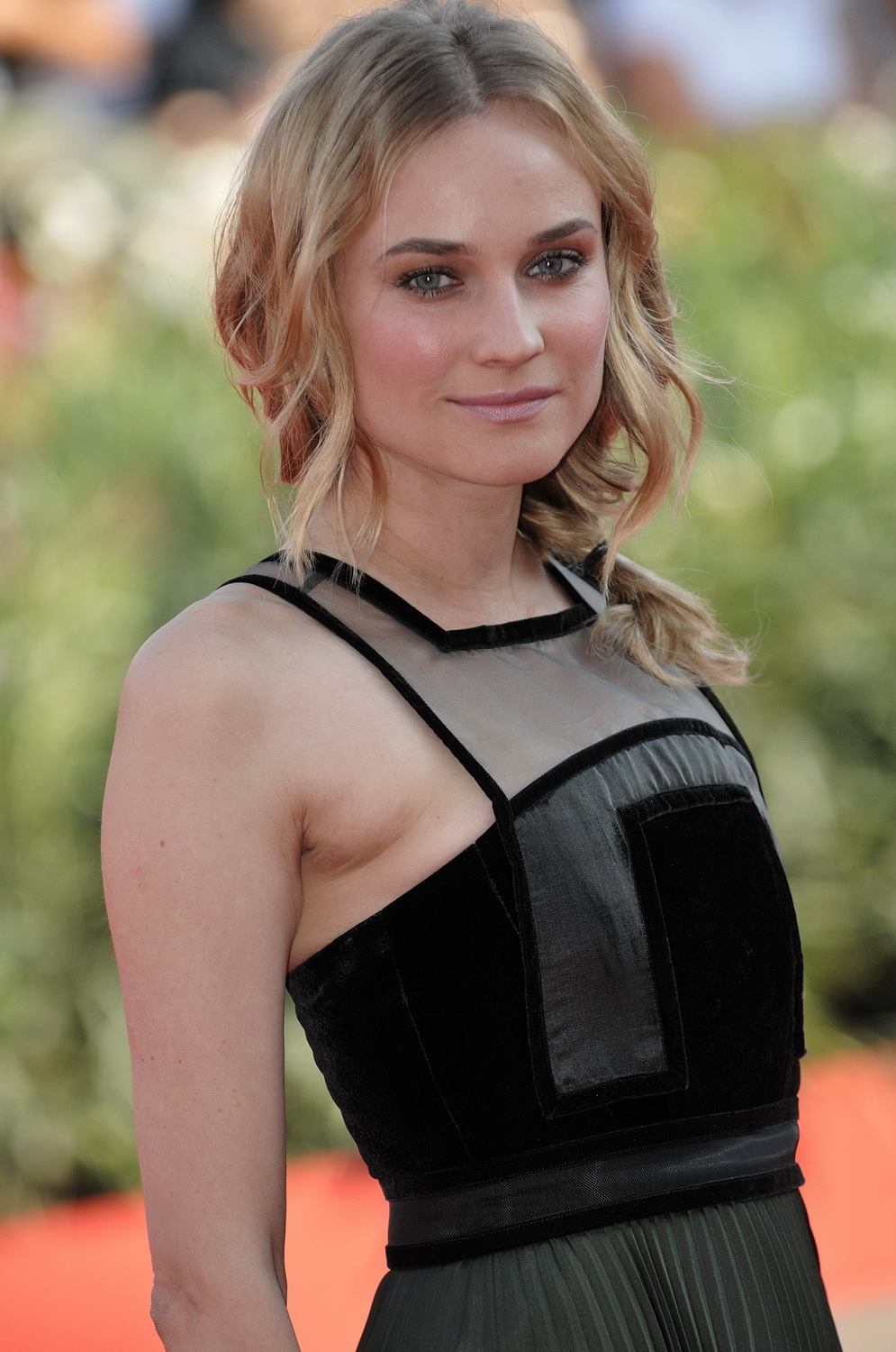 66ème Festival du Cinéma de Venise (Mostra), 10ème jour (11/09/2009) Tapis rouge avec Jared Leto, Diane Kruger, Sarah Polley et le réalisateur Jaco Van Dormel pour le film : MR. NOBODY